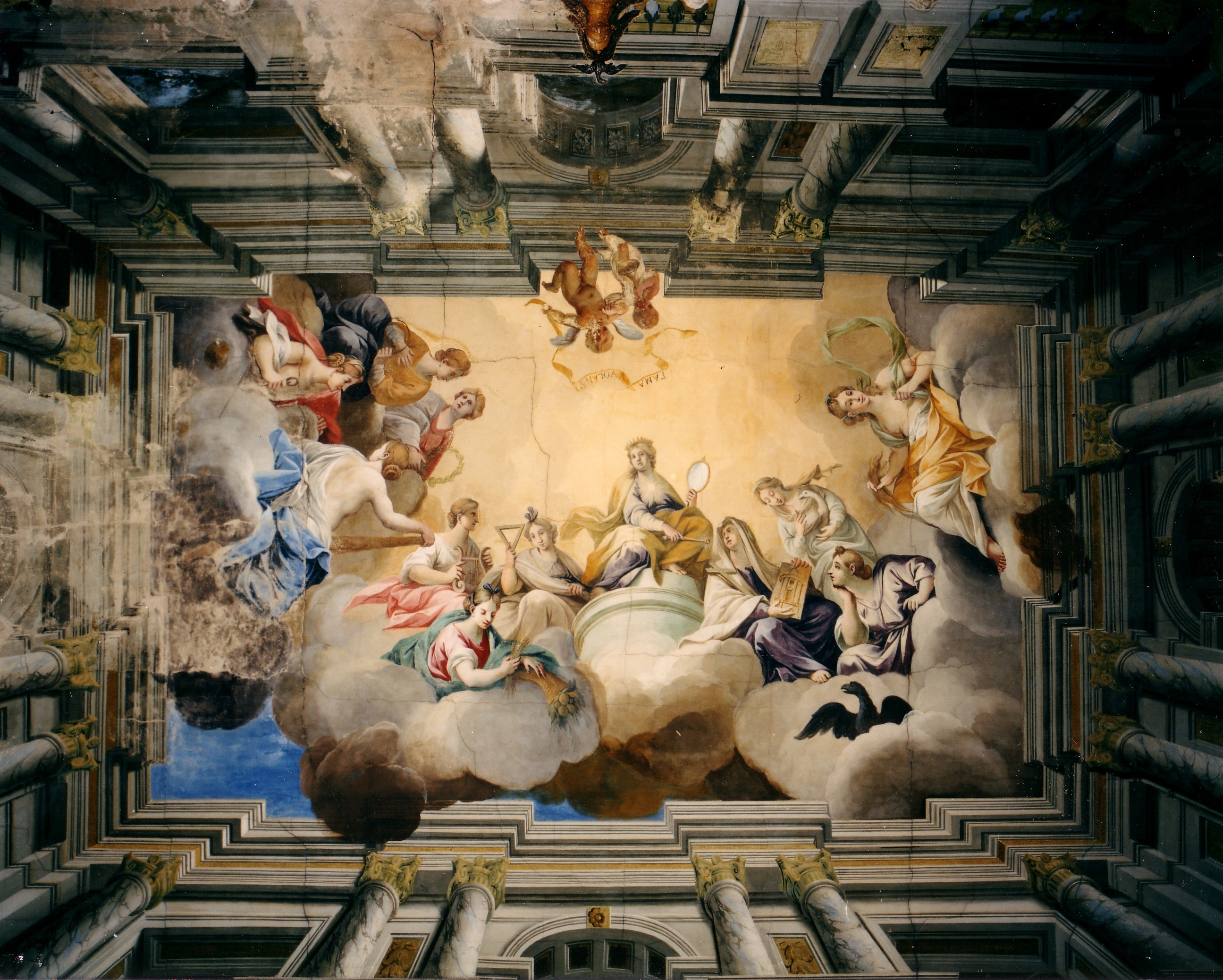 Deckengemälde von Giovanni Francesco Marchini im großen Saal des Barockschlosses Wiederau (Pegau)